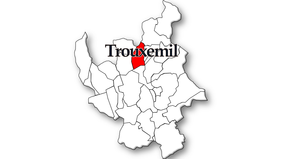 População